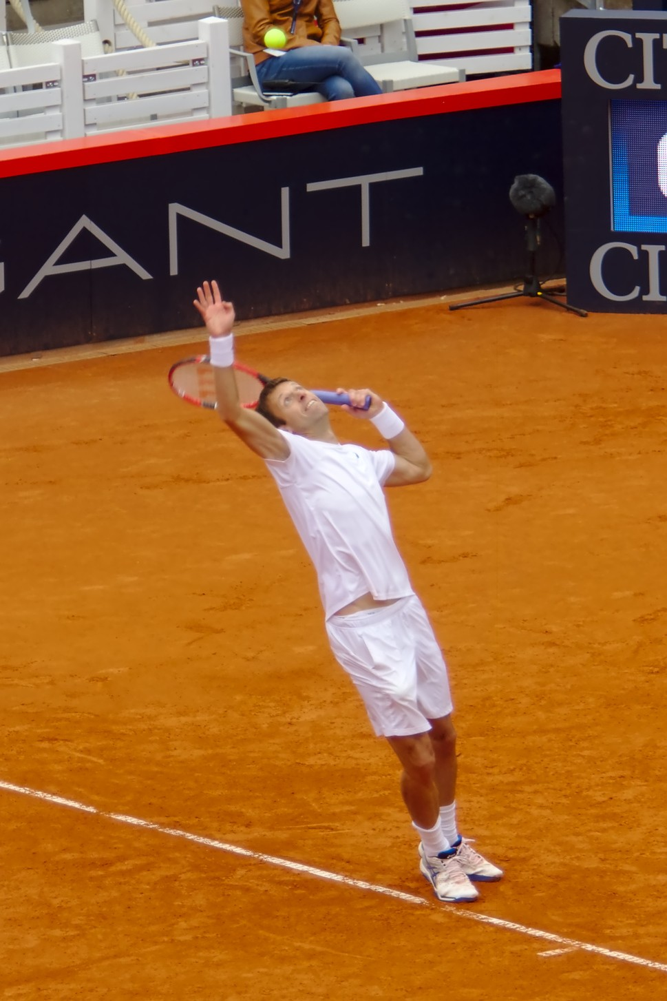 Daniel Nestor im Halbfinale der German Open 2016 in Hamburg Rothenbaum